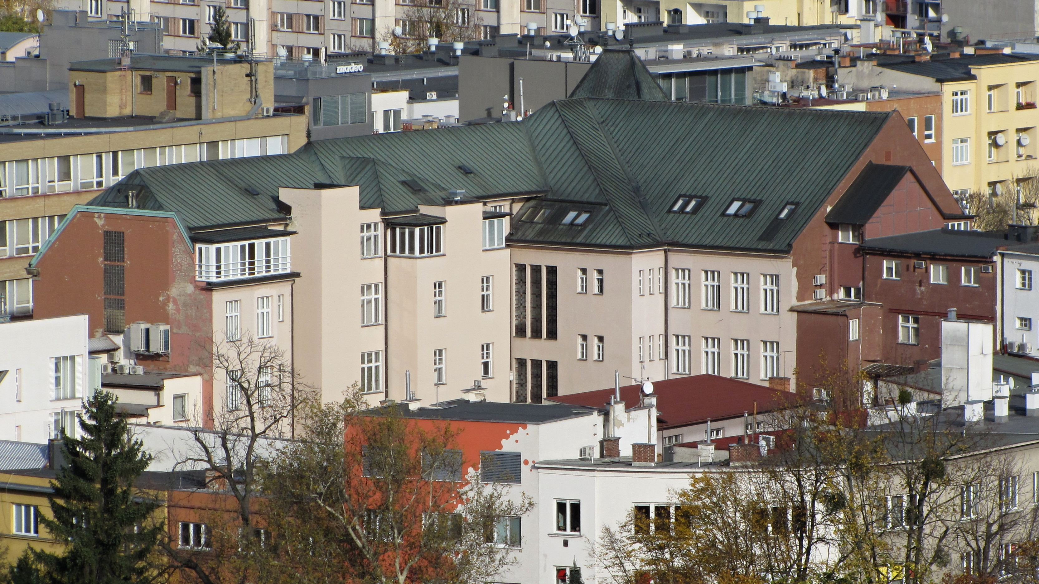 Pohled z Baťova markodrapu na zadní čast Zlínské radnice